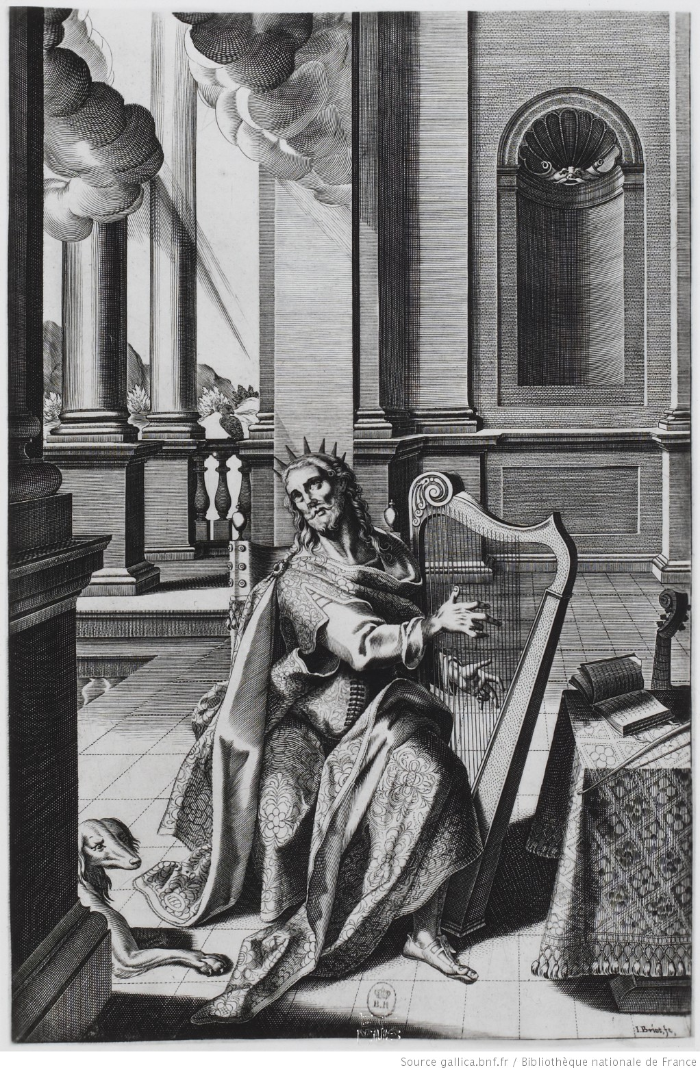 Isaac Briot David composant les psaumes